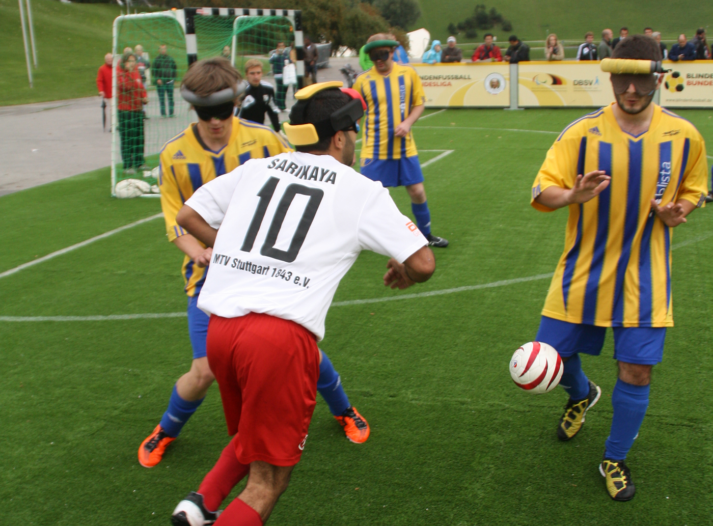 MTV Stuttgart 1843 e.V. (weiss/rot) gegen SF/BG Blista Marburg (blau/gelb). Kurz nach einer Ecke für Stuttgart. Vedat Sarikaya gegen Alican Pektas (rechts).